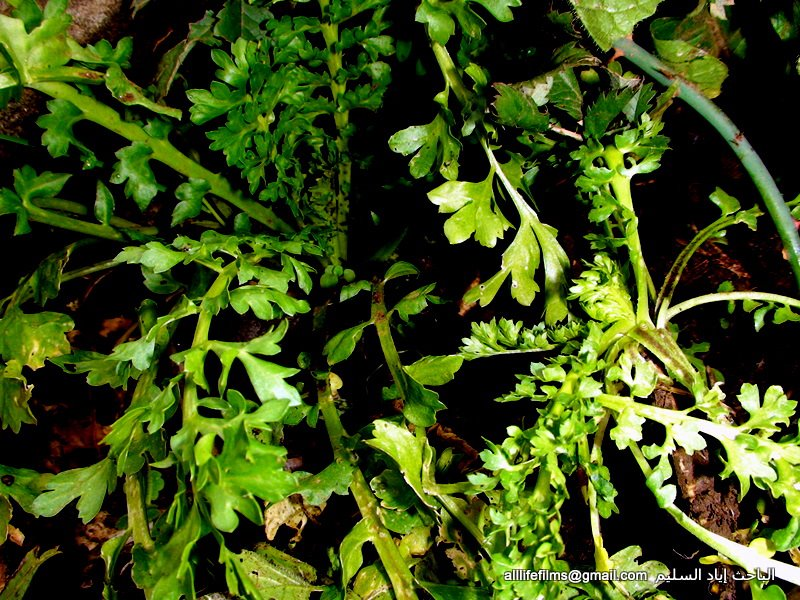 نباتات برّية سورية تؤكل